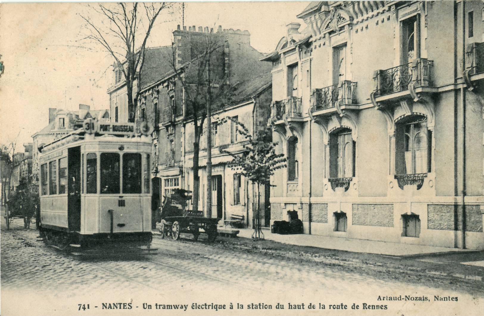 Carte postale ancienne éditée par Artaud-Nozais à Nantes, n°741 : NANTES - Un tramway électrique à la station du haut de la route de Rennes